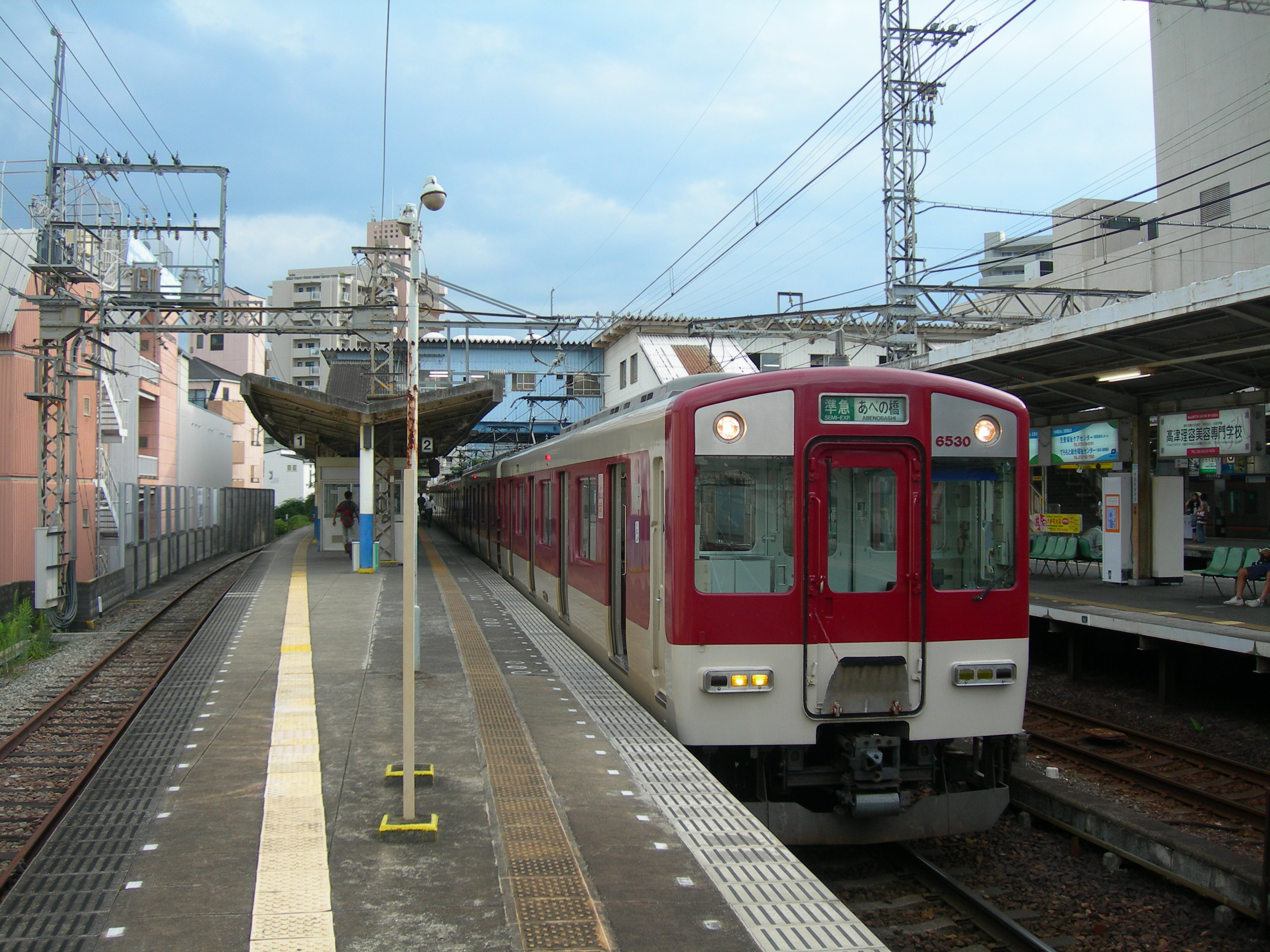 近鉄 河内長野駅ホーム